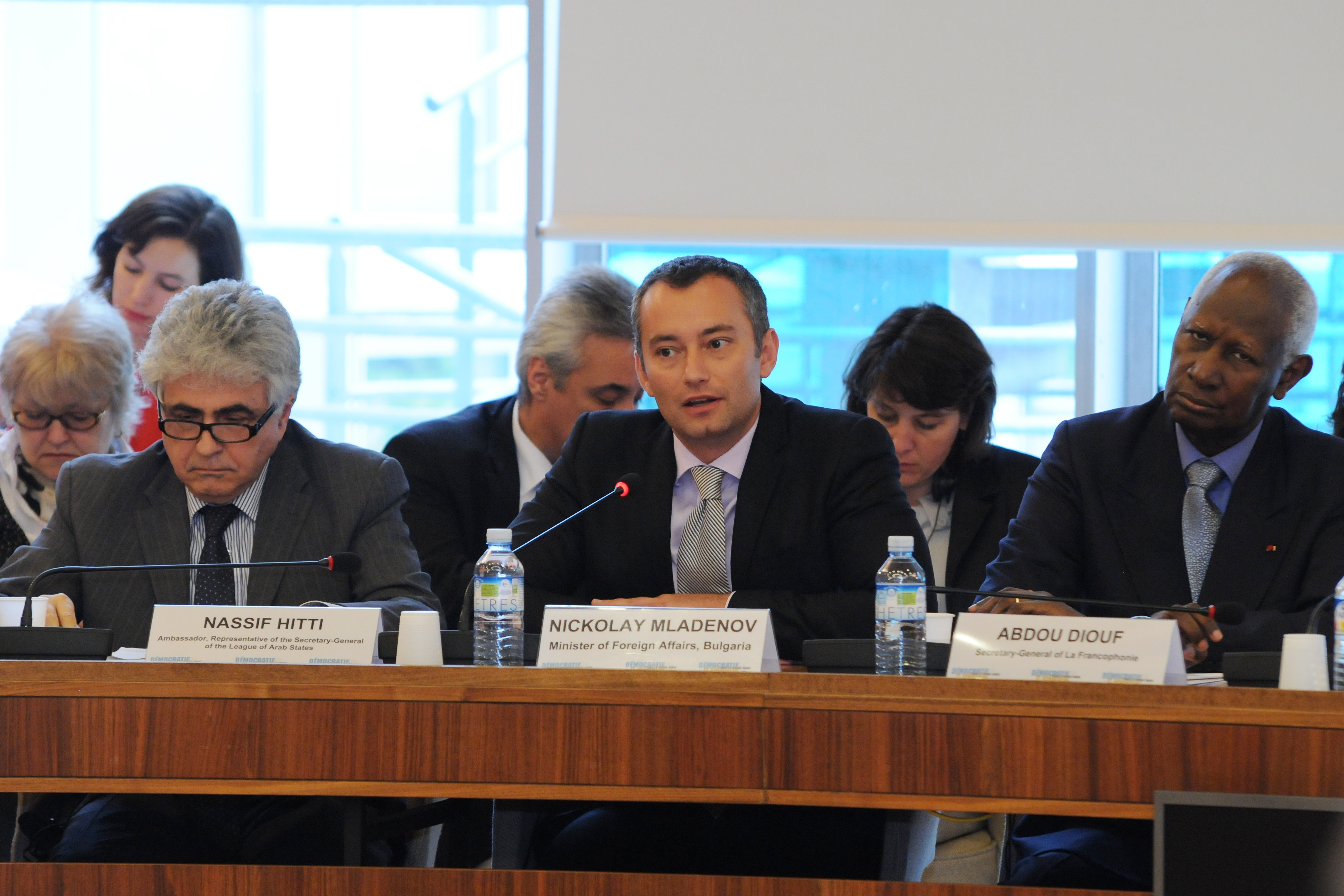 (©UNESCO/Ania Freindorf)